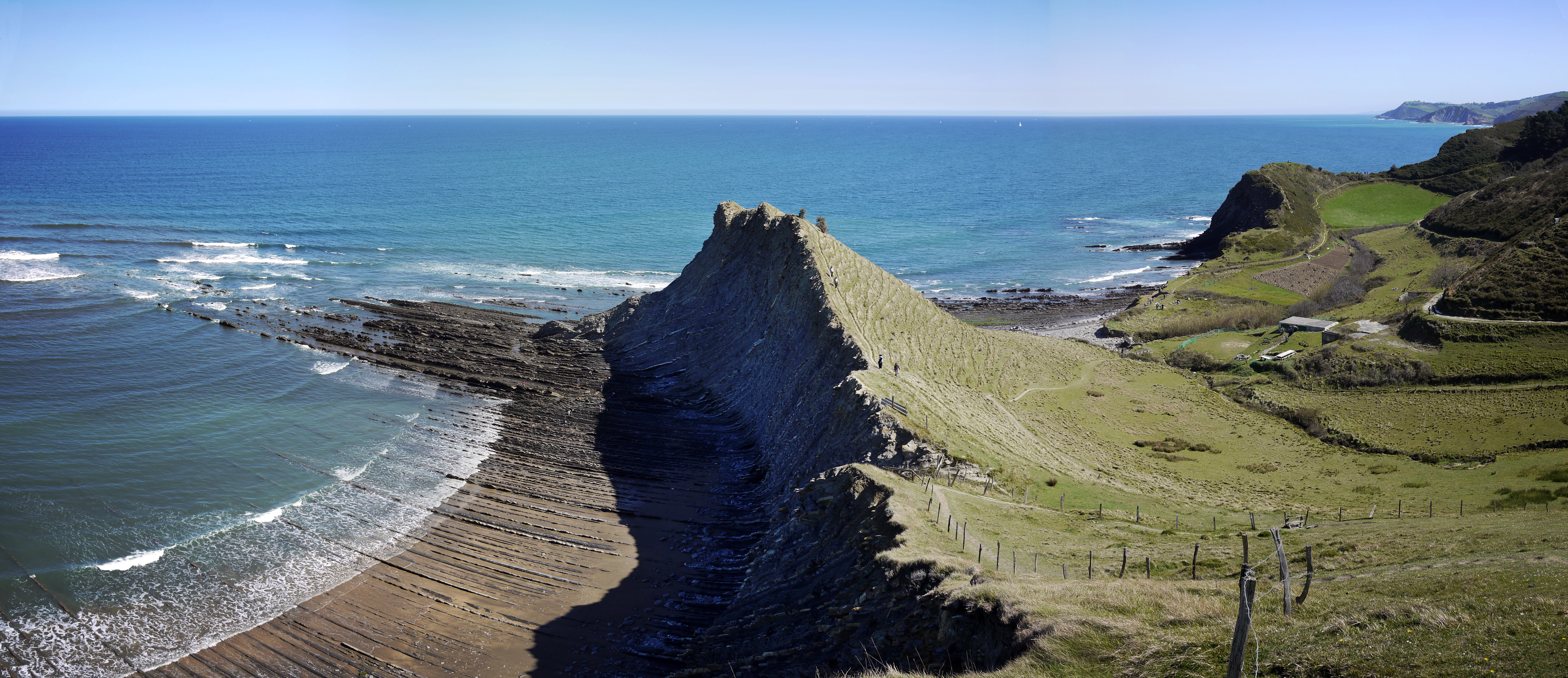 Sakoneta, Deba. Gipuzkoa, Euskal Herria. Sakoneta, Deba. Gipuzkoa, Basque Country.